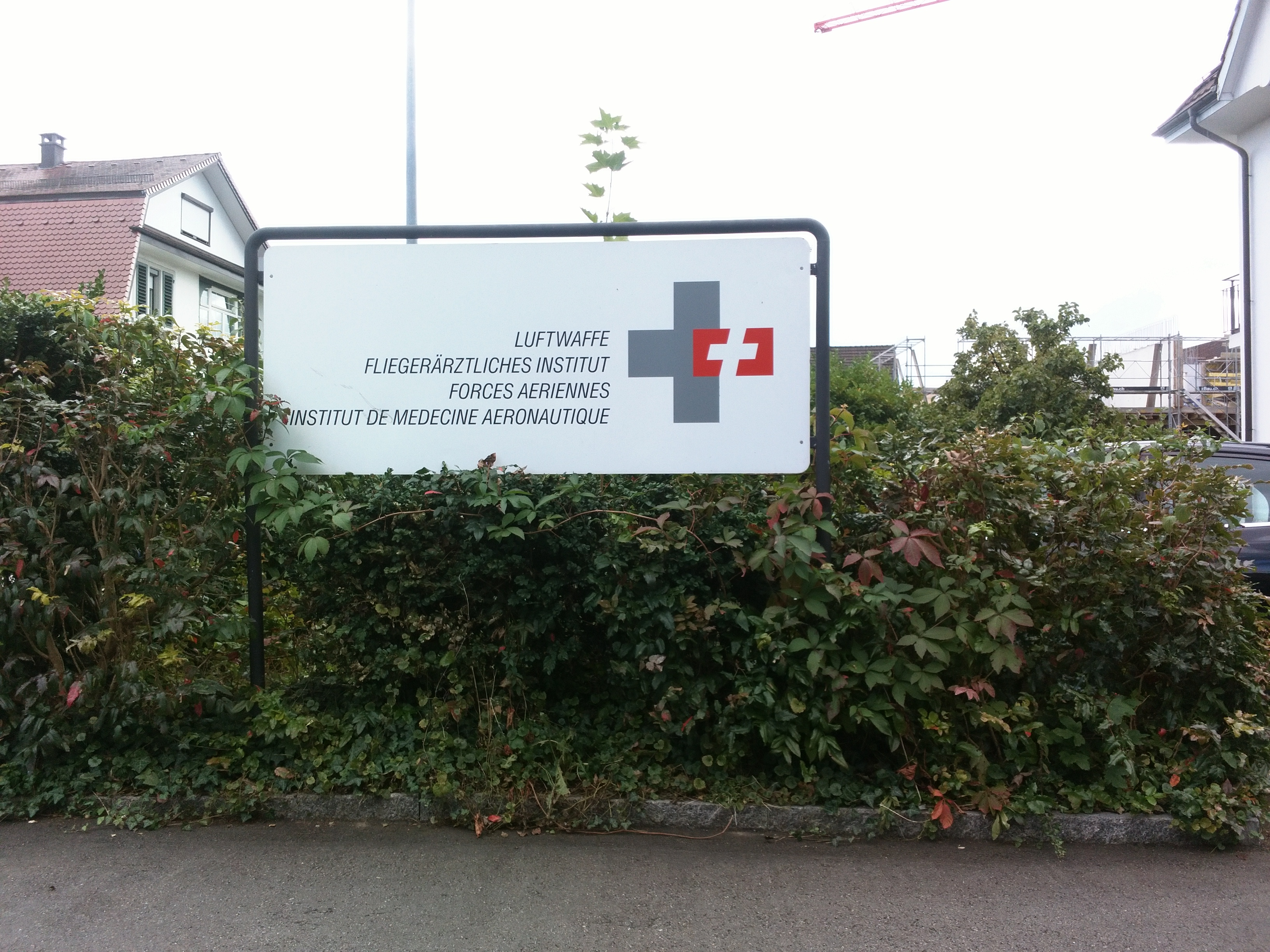 Schild FAI